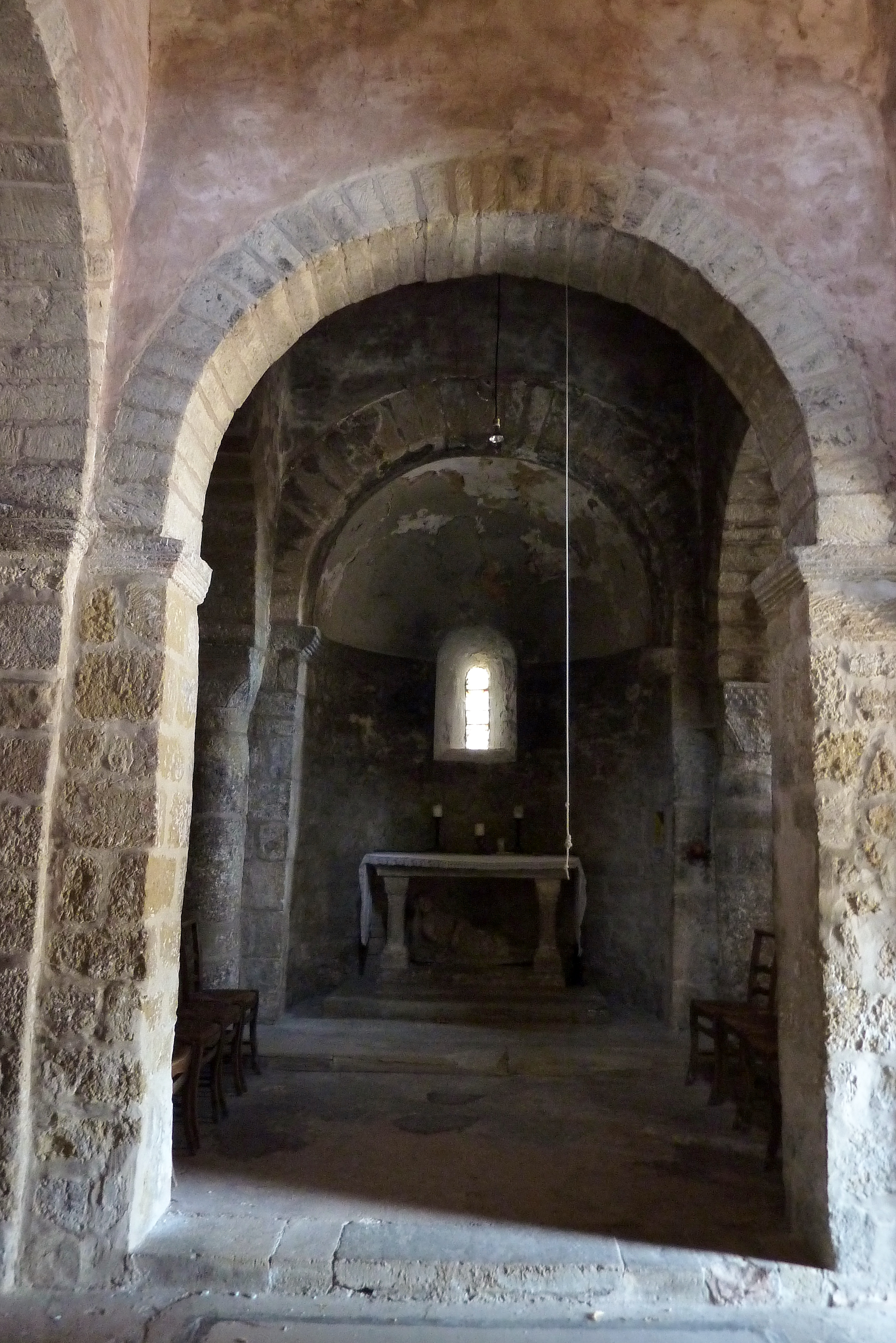 Romanische Kapelle Sainte-Madeleine in Bédoin, einer Gemeinde im Département Vaucluse in der französischen Region Provence-Alpes-Côte d’Azur, Mittelschiff und mittlere Apsiskapelle